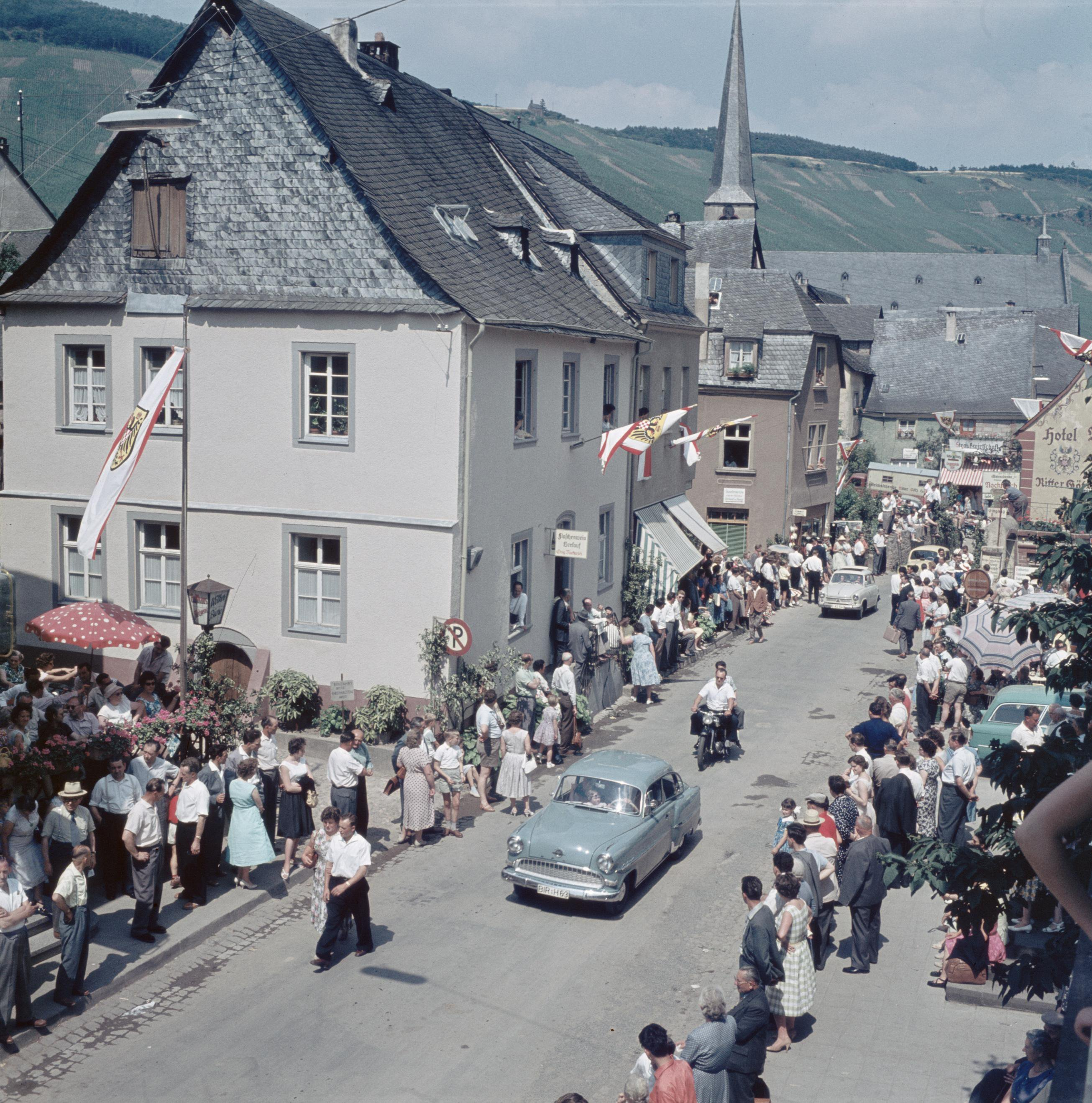 Collectie / Archief : Fotocollectie Van de Poll Reportage / Serie : Moezel: Klederdracht- en wijnfeest Beschrijving : Toeschouwers stellen zich op langs de route van de optocht Datum : 4 juli 1959 Locatie : Duitsland, Kröv, Rijnland-Palts, West-Duitsland Trefwoorden : optochten, publiek, volksfeesten Fotograaf : Poll, Willem van de, [onbekend] Auteursrechthebbende : Nationaal Archief Materiaalsoort : Glasnegatief Nummer archiefinventaris : bekijk toegang 2.24.14.02 Bestanddeelnummer : 254-6088